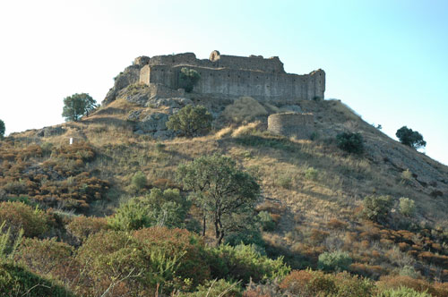 Castell de Quermançó. Vilajuïga, Alt Empordà